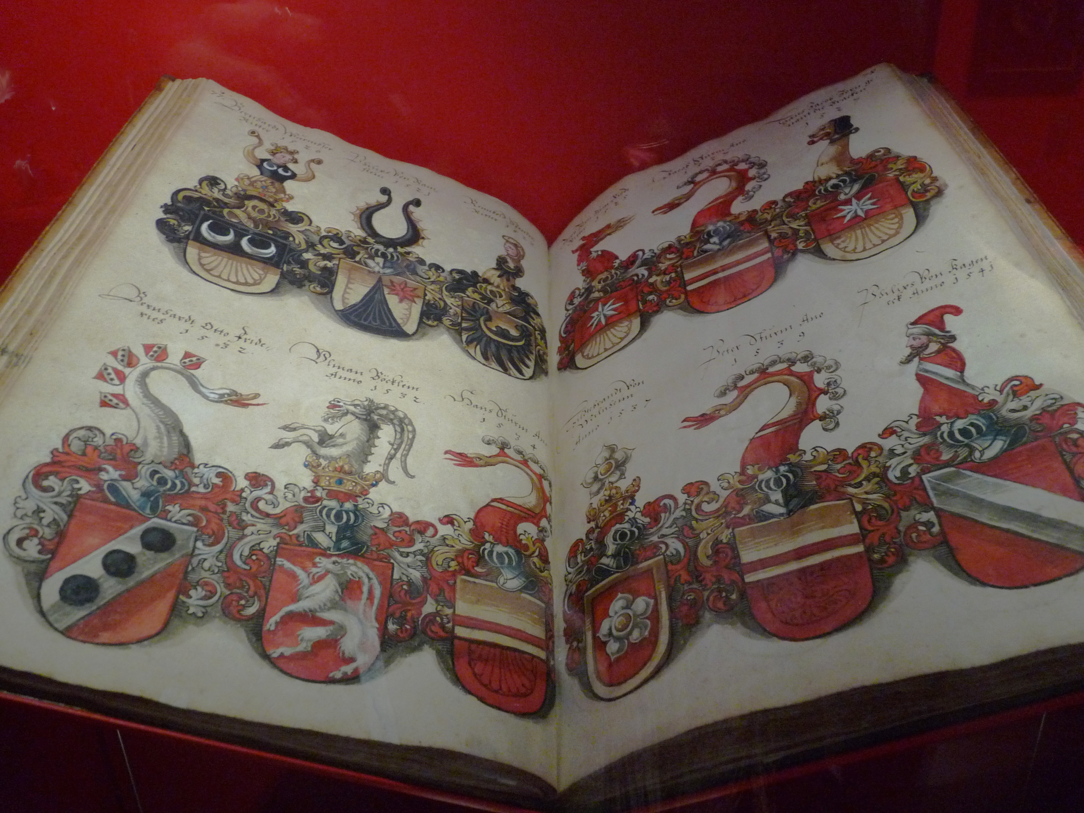 Armorial des Stettmeister et Ammeister de Strasbourg. Attribué à Sebald Buheler pour la période 1582-1589, complété par d'autres pour les deux siècles suivants. (Musée historique de Strasbourg)